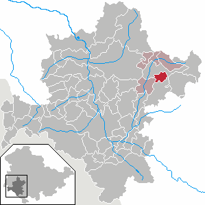 Bermbach in Thuringia - District Schmalkalden-Meiningen